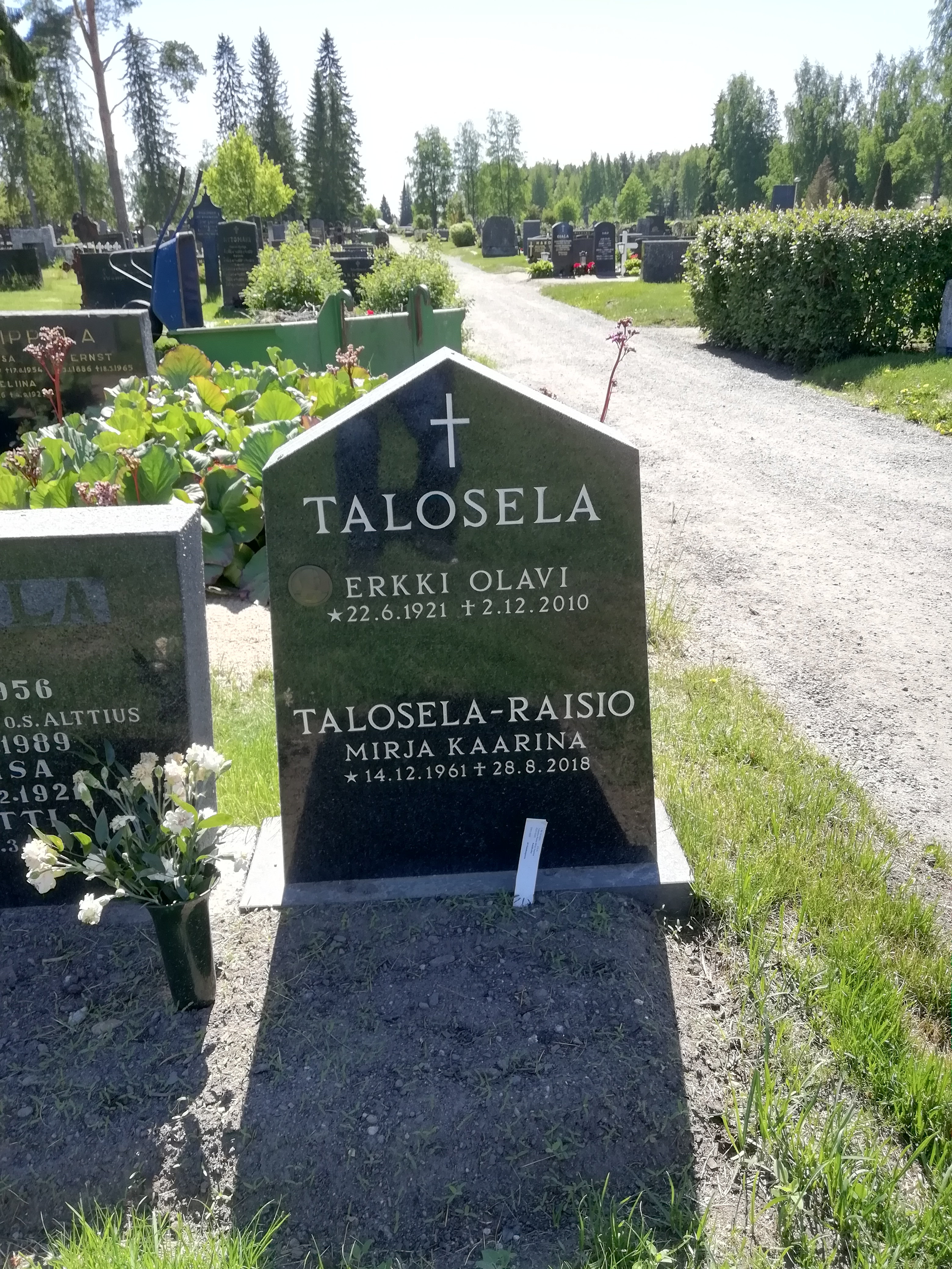 Painija Erkki Taloselan hautakivi Lapuan hautausmaalla.